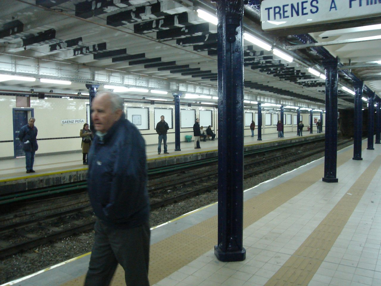 Vista del andén a Plaza de Mayo de la estación Sáenz Peña de la línea A de subterráneos porteña.